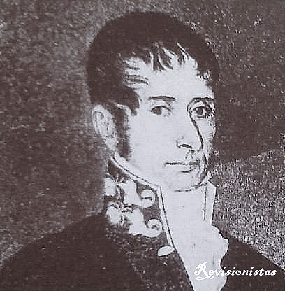 retrato de Juan Gregorio Lemos (1764-1822) militar argentino